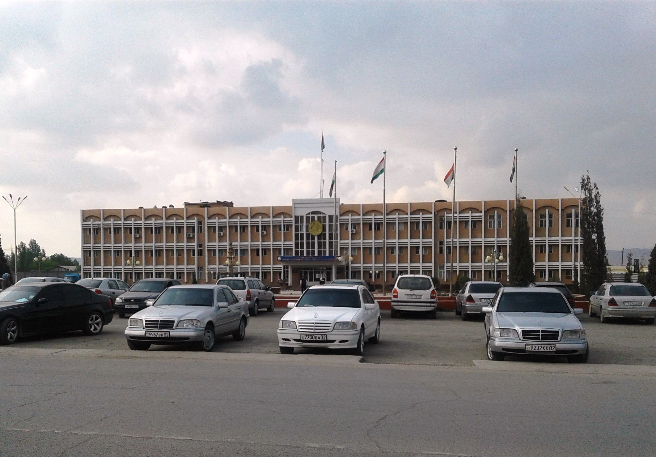 Город Исфара, Согдийская область, Таджикистан